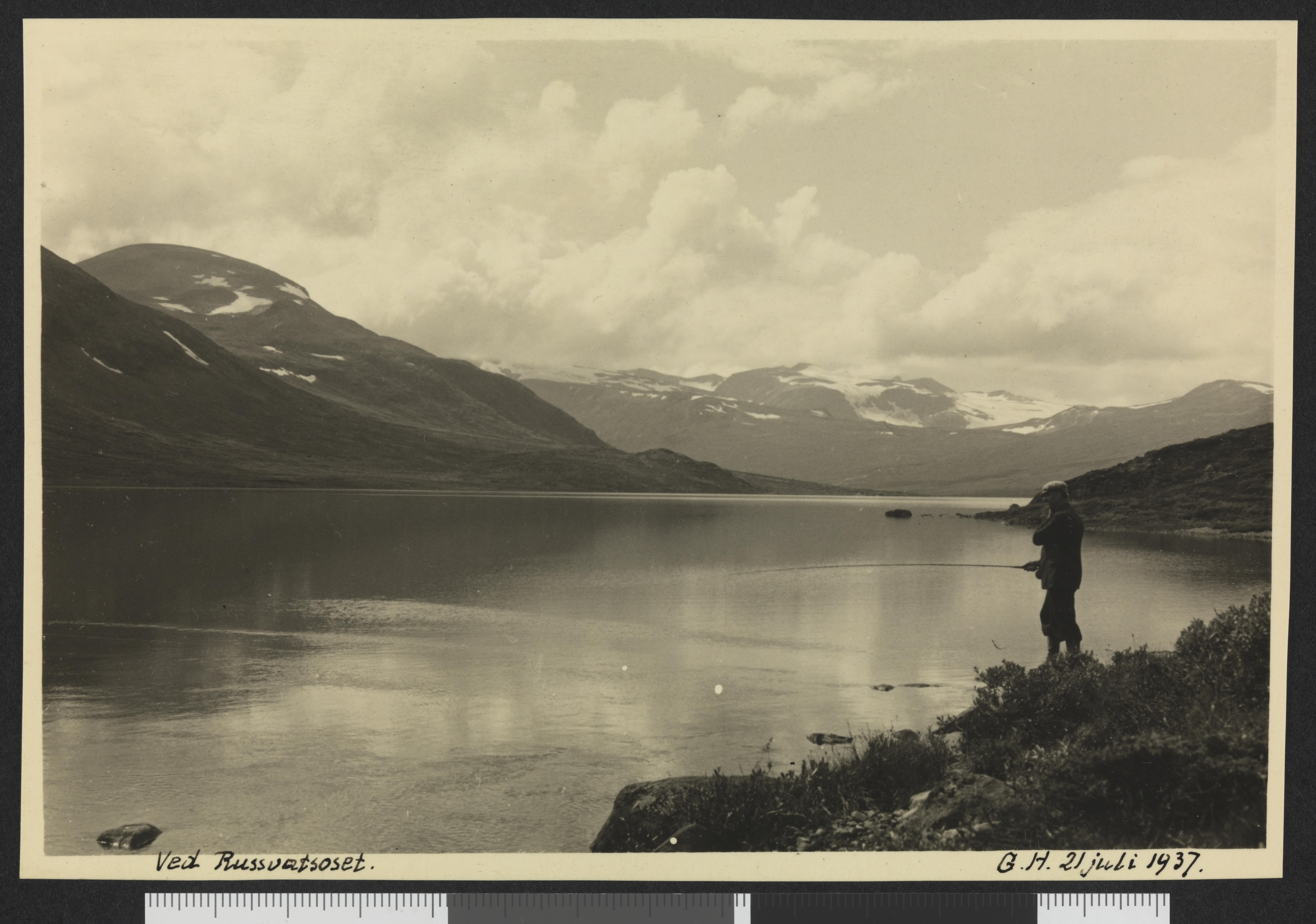 Bildet er hentet fra Nasjonalbibliotekets bildesamling. Anmerkninger til bildet var: Selvportrett. Russvatnet, Vågå, Oppland Depicted person: Holmsen, Gunnar